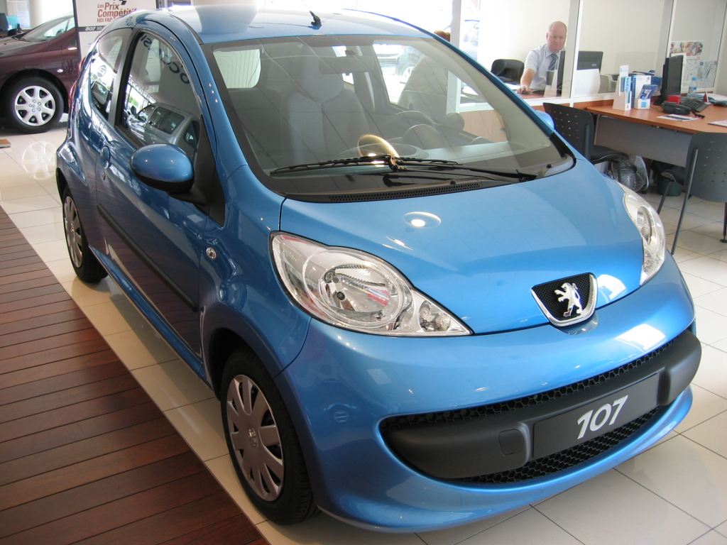 Peugeot 107